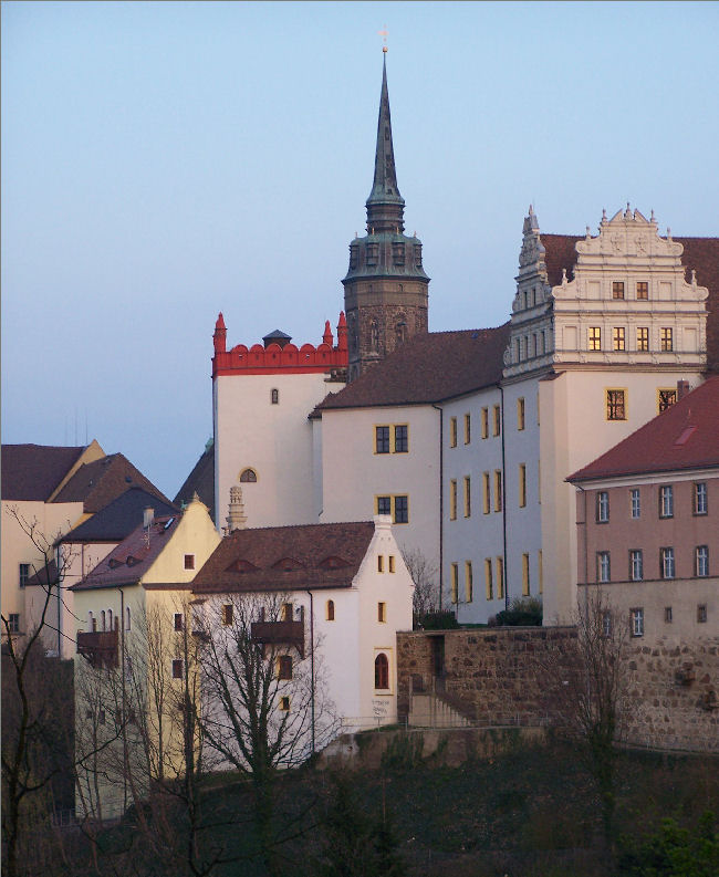 Hofrichterhaus der Ortenburg in Bautzen, Blick vom Protschenberg